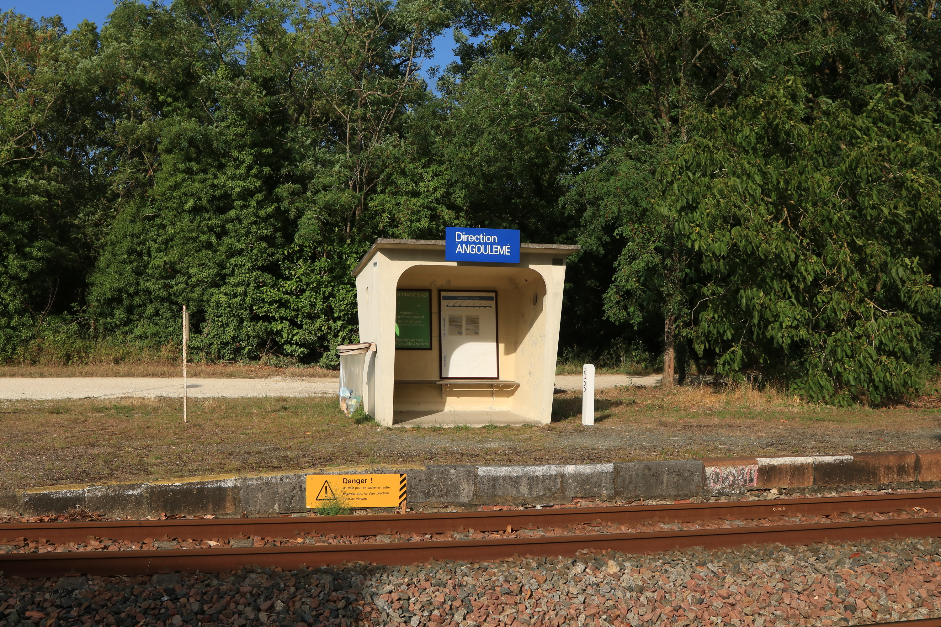 Vue du quai de la gare de Beillant desservit par les trains effectuant Saintes - Angoulême.